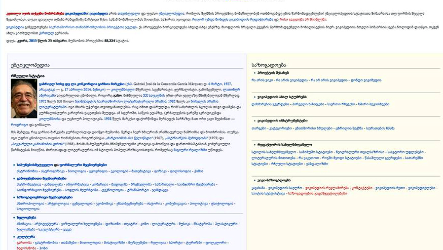 ქართული ვიკიპედიის მთავარი გვერდი, პირველი ვერსია